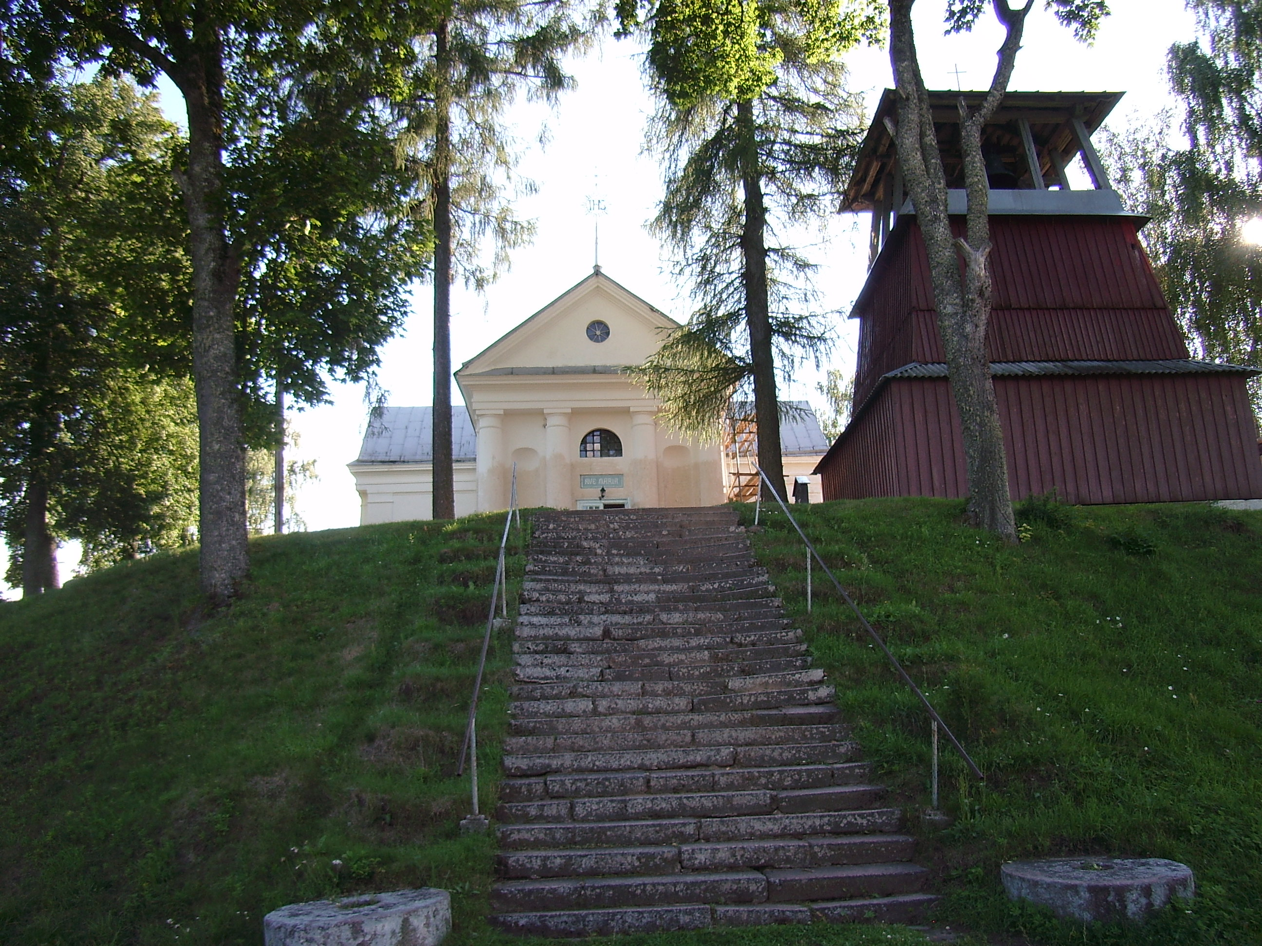 Беларуская (тарашкевіца): Былая сядзіба К. Сулістроўскага: фрагмэнты парку уязная алея сыстэма сажалак касьцёл, званіца, плябанія гаспадарчы двор руіны сьпіртзавода. в. Шэметава This is a photo of Belarusian heritage monument. Reference number: 613Г000464 ( WLM)